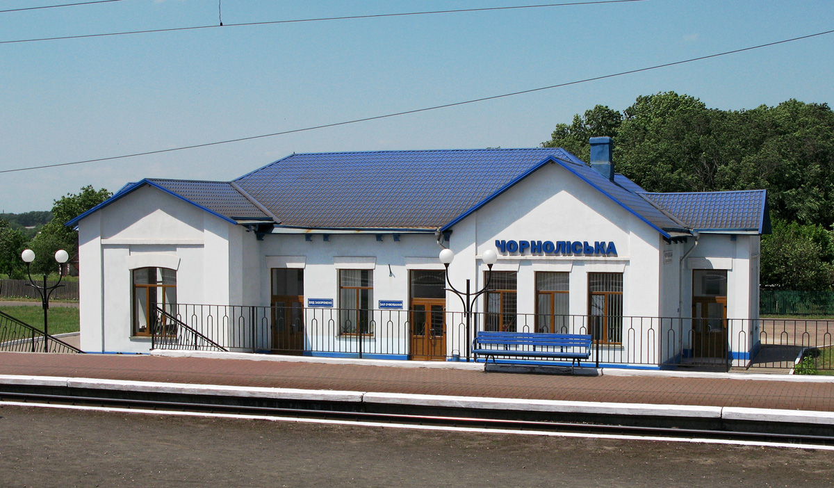 Вокзал ст. Чорноліська